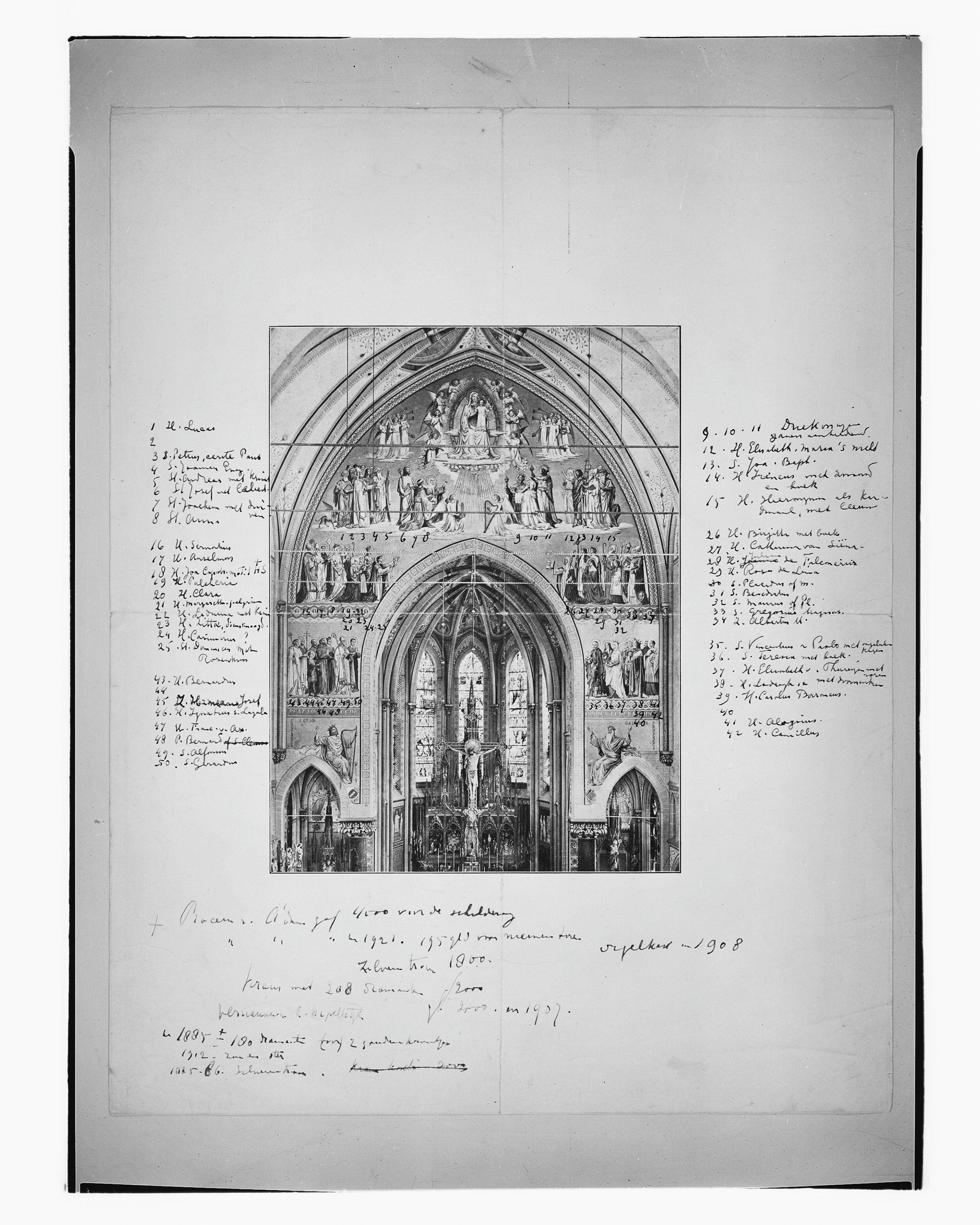 Kapel In Het Zand: schildering in koor tekening van Dhr.Donker